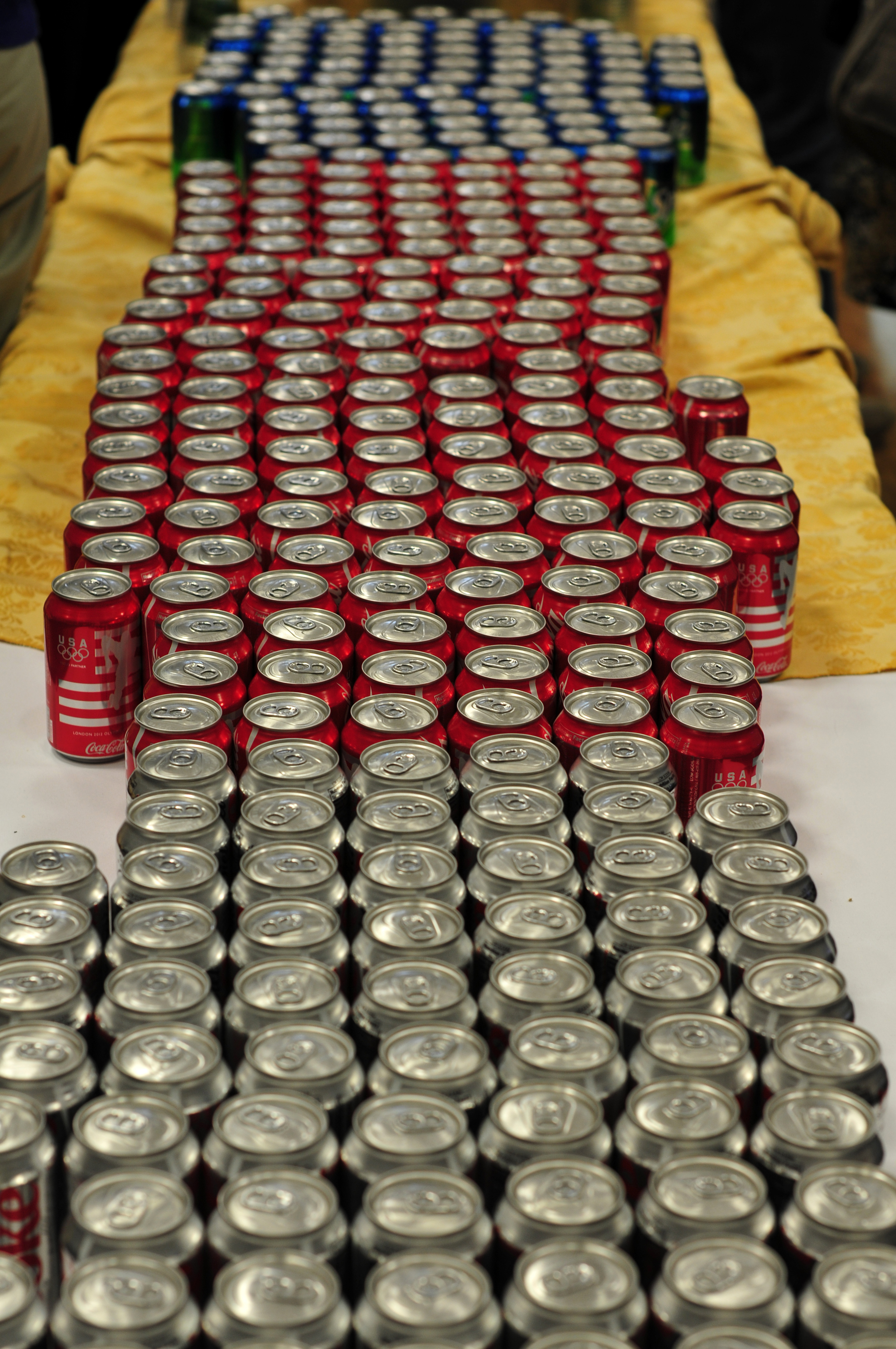 Impressionen Wikimania Washington D.C. 2012 The making of this work was supported by Wikimedia Austria. For other files made with the support of Wikimedia Austria, please see the category Supported by Wikimedia Österreich.